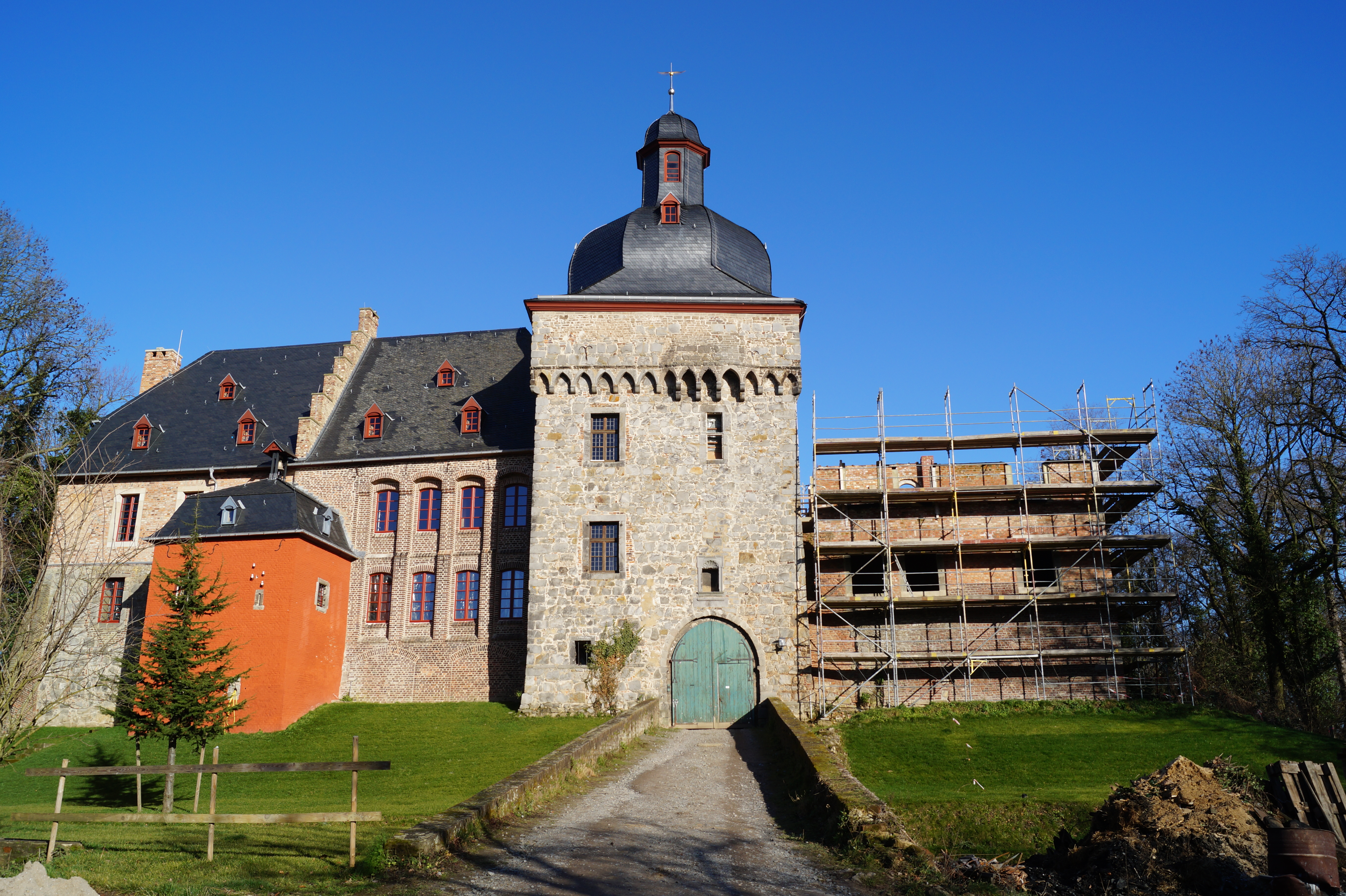 Liedberger Schloss während der Restaurierung 2014